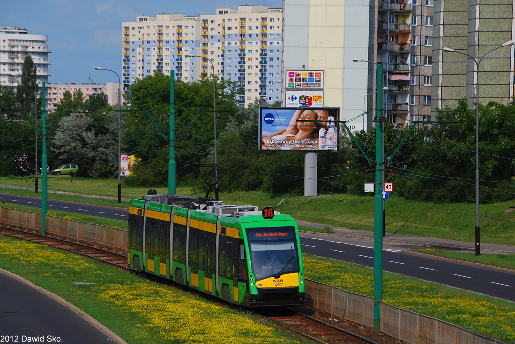 Solaris Tramino #538 na linii numer 16